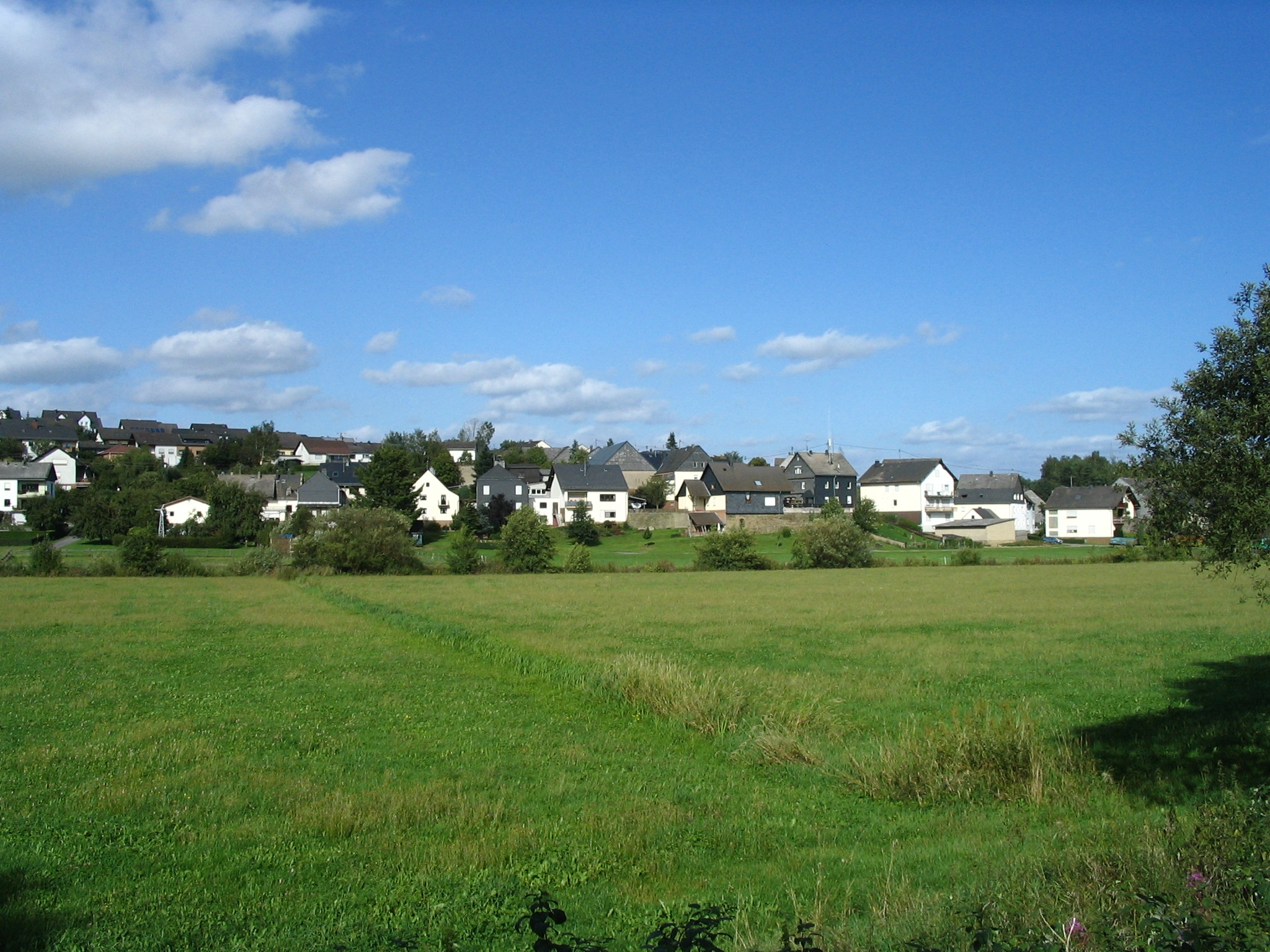 Kümdchen im Hunsrück